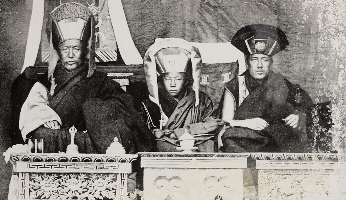 Meyer, Elisabeth Tre Buddhar. Tibet ca 1932. Tre Buddhaer. Etter Tibetansk oppfatning er disse imidlertid ikke inkarnasjonen av Buddha, men av et eller annet berømt vesen: en lama, en helt, en demon etc. 9,6 x 16,4 cm Sølvgelatin. NMFF.003380-7